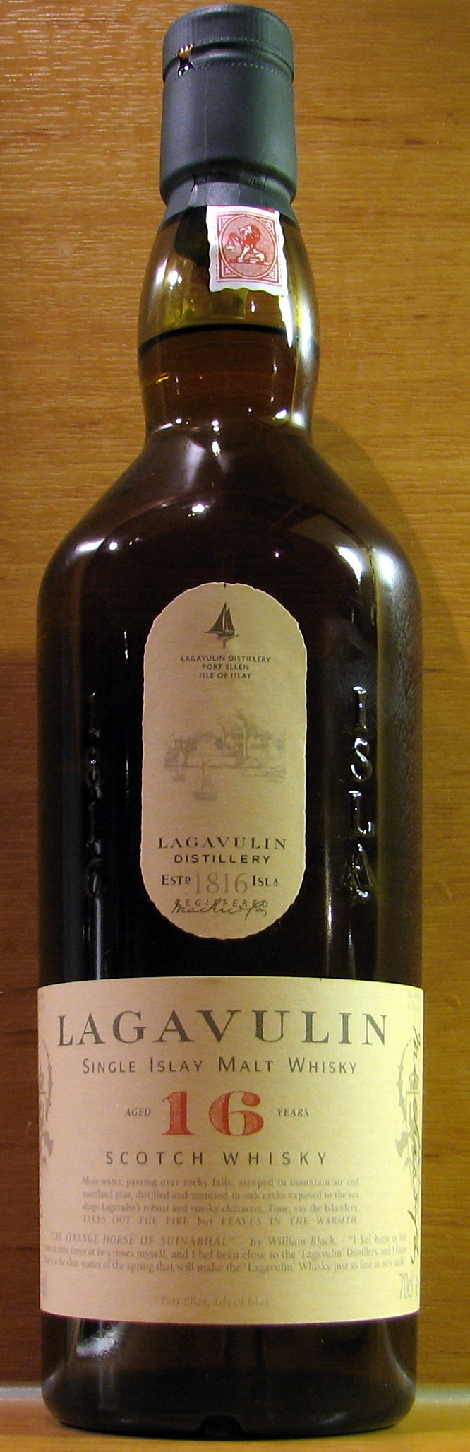 Lagavulin Single Islay Malt Whisky 16 years old